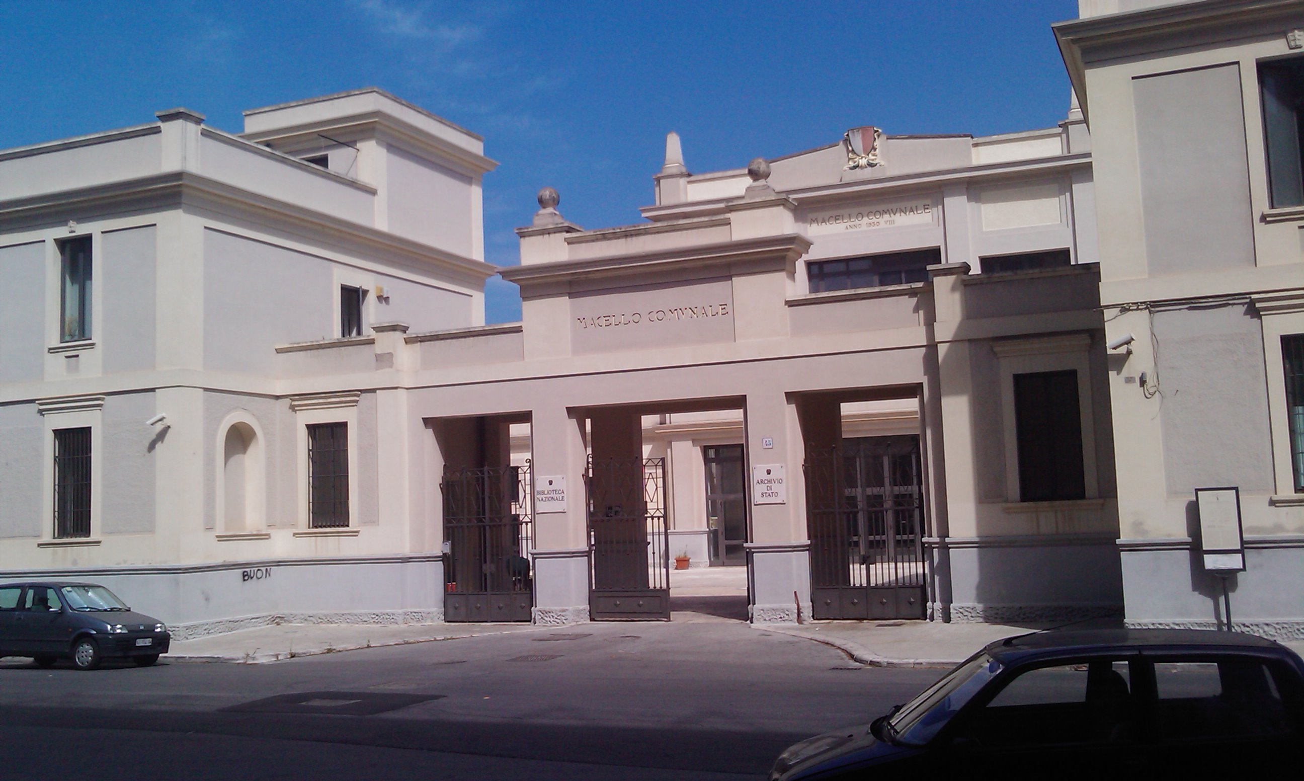 Facciata della Biblioteca Nazionale Sagarriga Visconti-Volpi di Bari